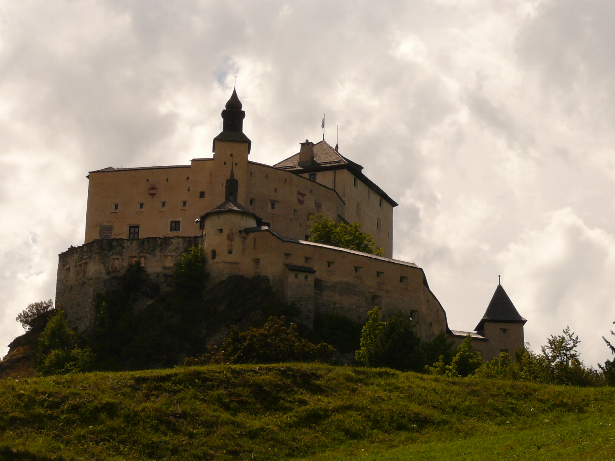 Castello di Tarasp